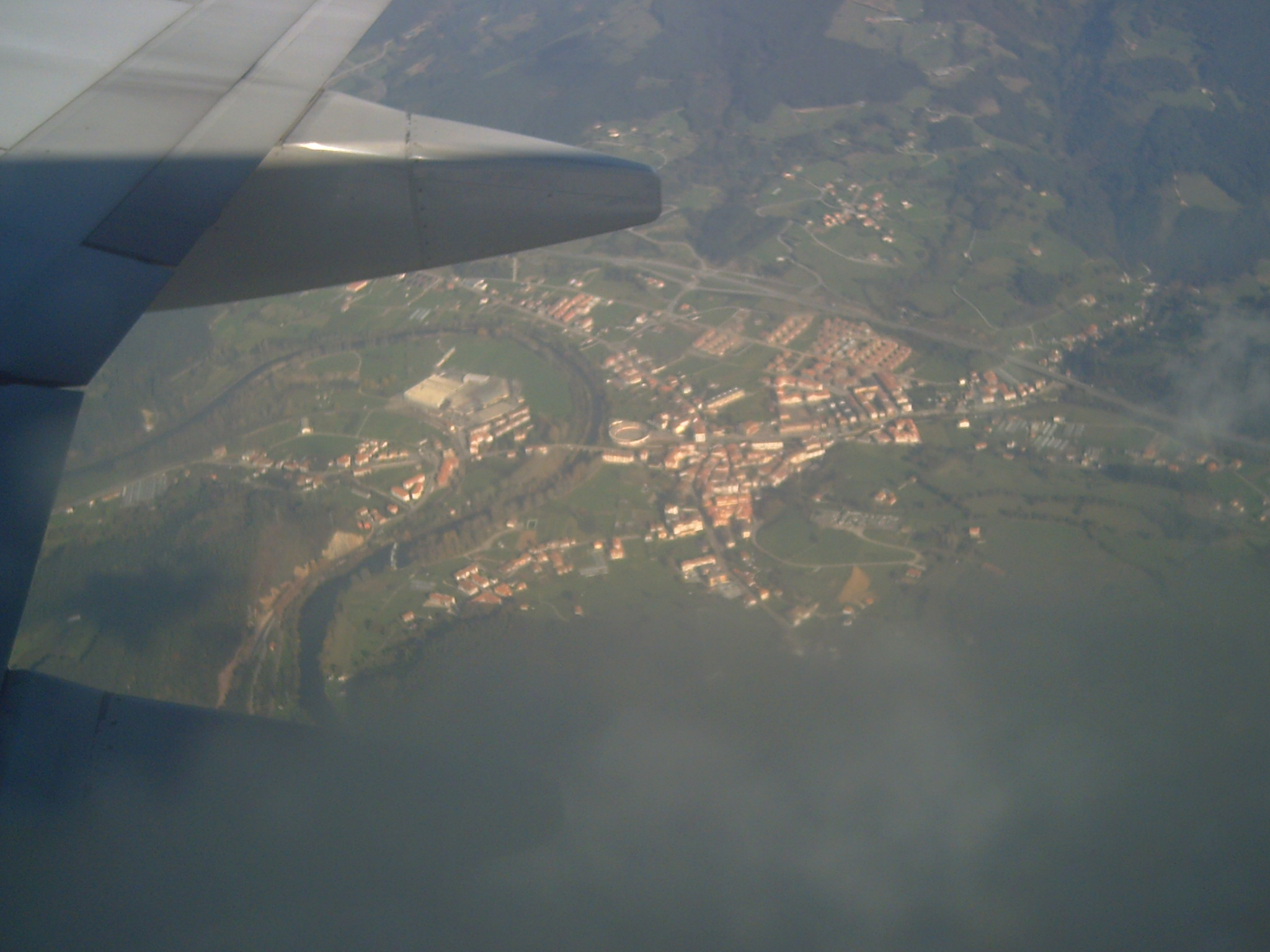 Vista aérea de Ampuero Aerial view of Ampuero, Cantabria (Spain) Vista aérea de Ampuero, Cantabria (España) Autor:xuankar